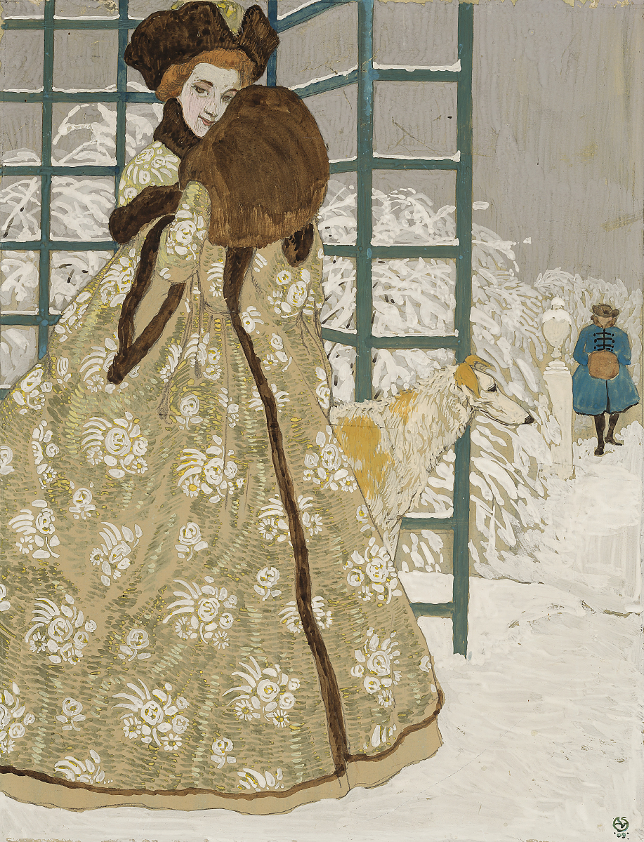 Alexander von Salzmann: In Erwartung. Gouache, Aquarell und Deckweiß über Bleistift auf Karton, 44 x 34 cm, rechts unten monogrammiert und datiert „AvS .09.“